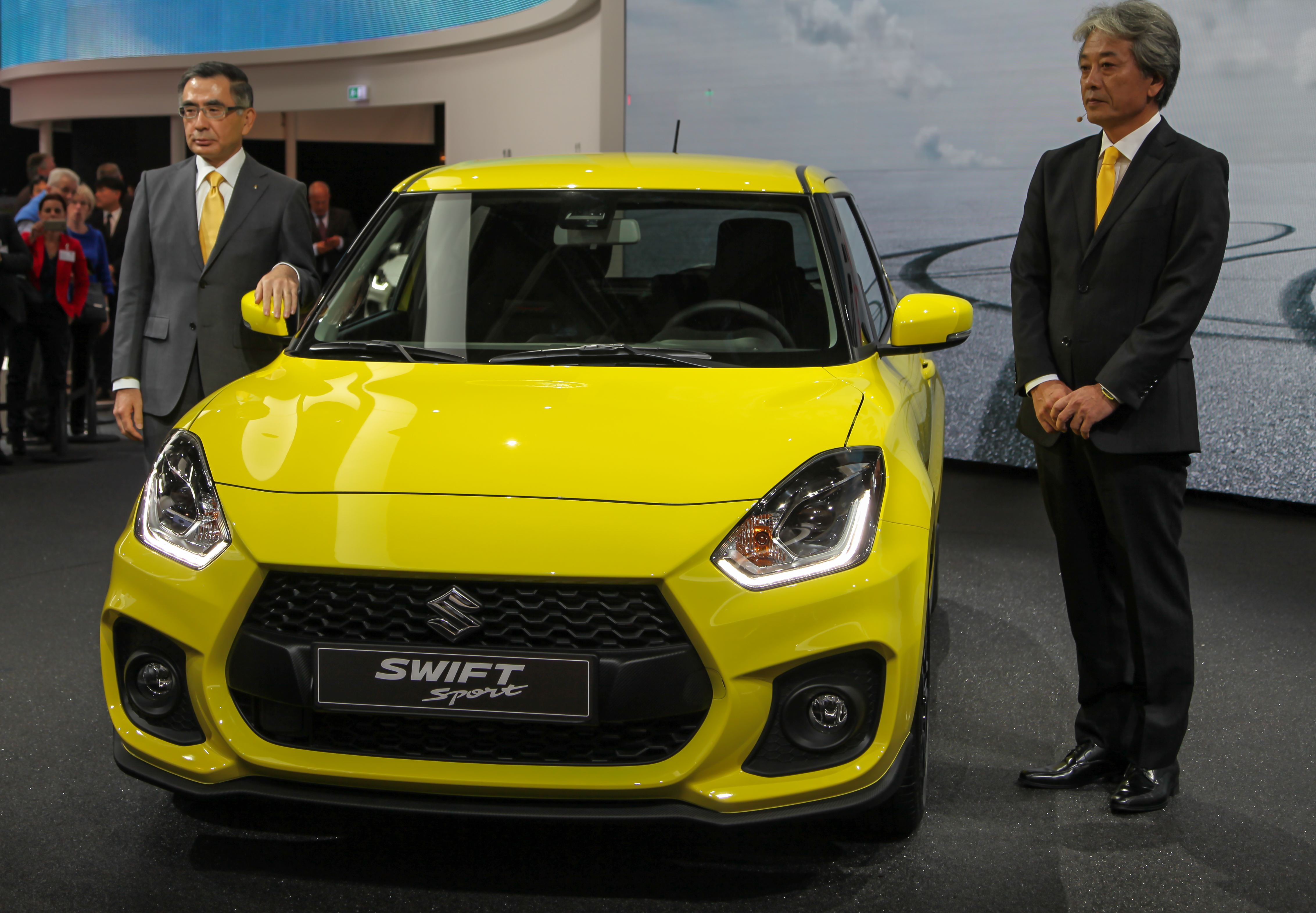 Suzuki Swift Sport, Vorstellung